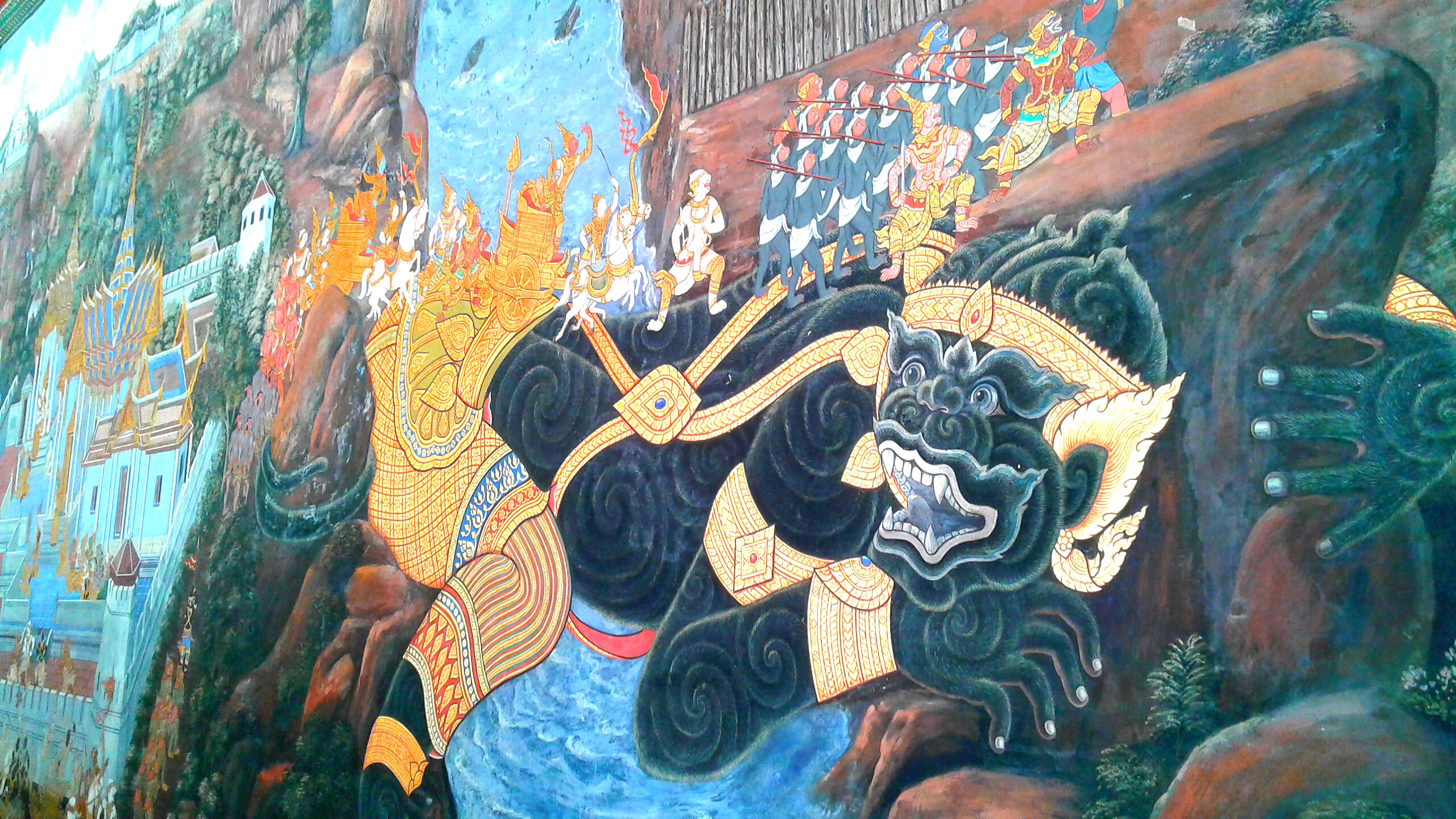 @ในภาพนิลรภัทร แปลงกายตนทอดเป็นสะพาน ให้กองทัพข้ามไปยังเมืองกรุงลงกา ภาพจิตรกรรมฝาผนังวัดพระแก้ว